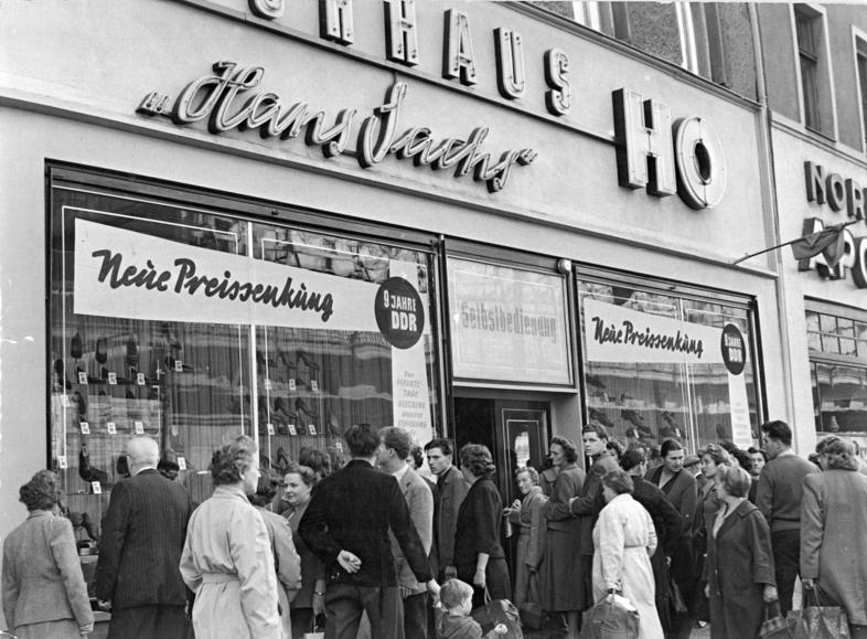 Berlin, Schönhauser Allee, Schuhgeschäft Zentralbild Sturm 6.10.58 Wo-L Neue Preissenkung in Kraft-Erhöhter Käuferansturm in den Schuhgeschäften Berlins. Hochbetrieb herrschte am 6.10.1958 in allen Berliner Schuhgeschäften. Die erneute Preissenkung hatte die Berliner angelockt. Bereits vor Eröffnung der Geschäfte standen zahlreiche Kauflustige vor den Geschäften, um sich mit einem Blick in die geschmackvoll dekorierten Schaufenster noch einmal davon zu überzeugen, welcher Schuh für "ihn" oder für "sie" der richtige sei. (Näheres siehe ADN-Meldung Nr. 400 v. 6.10.58) "UB": Kauflustige Berliner vor dem HO-Schuhhaus "Hans Sachs" in der Schönhauser Allee.